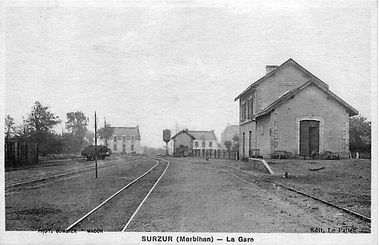 La gare de Surzur des lignes de chemin de fer d'intérêt local, à voie métrique, de La Roche-Bernard à Locminé et de Surzur à Port-Navalo. Elle est située à Surzur dans le Morbihan.